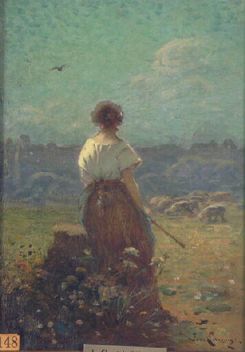 Jean_Laronze,1852-1937,Le_chant_de_l'Alouette,46,5x34_cm,Mâcon,Musée_des_Ursulines.jpg